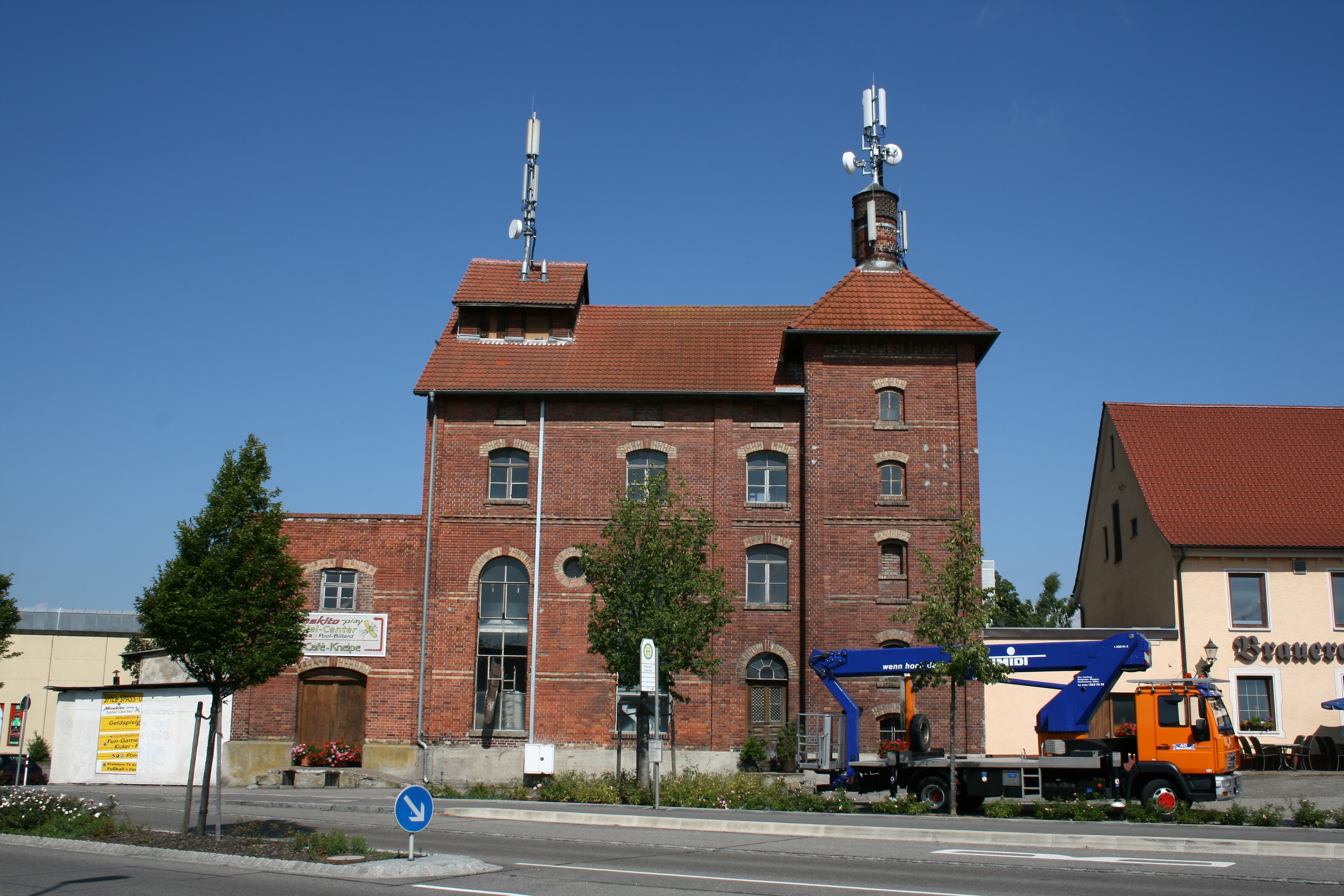 Bräuhaus Seybold in Nersingen im Landkreis Neu-Ulm